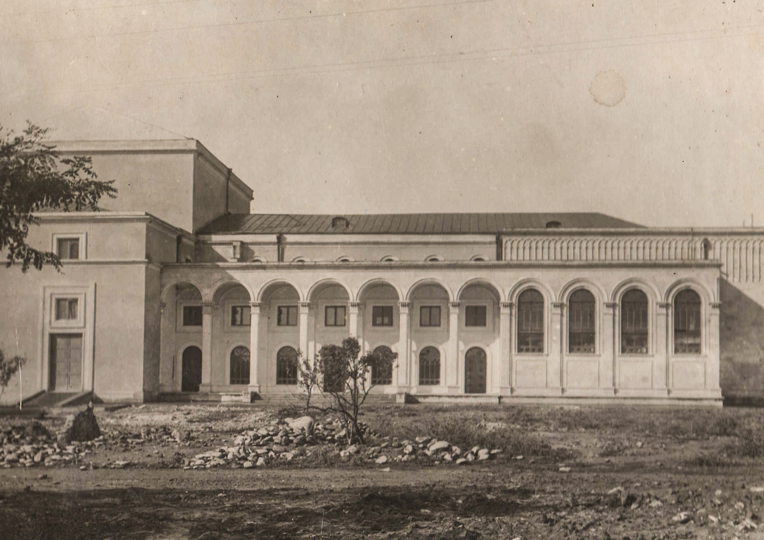 ერისთავის თეატრის შენობა 1934 წელი